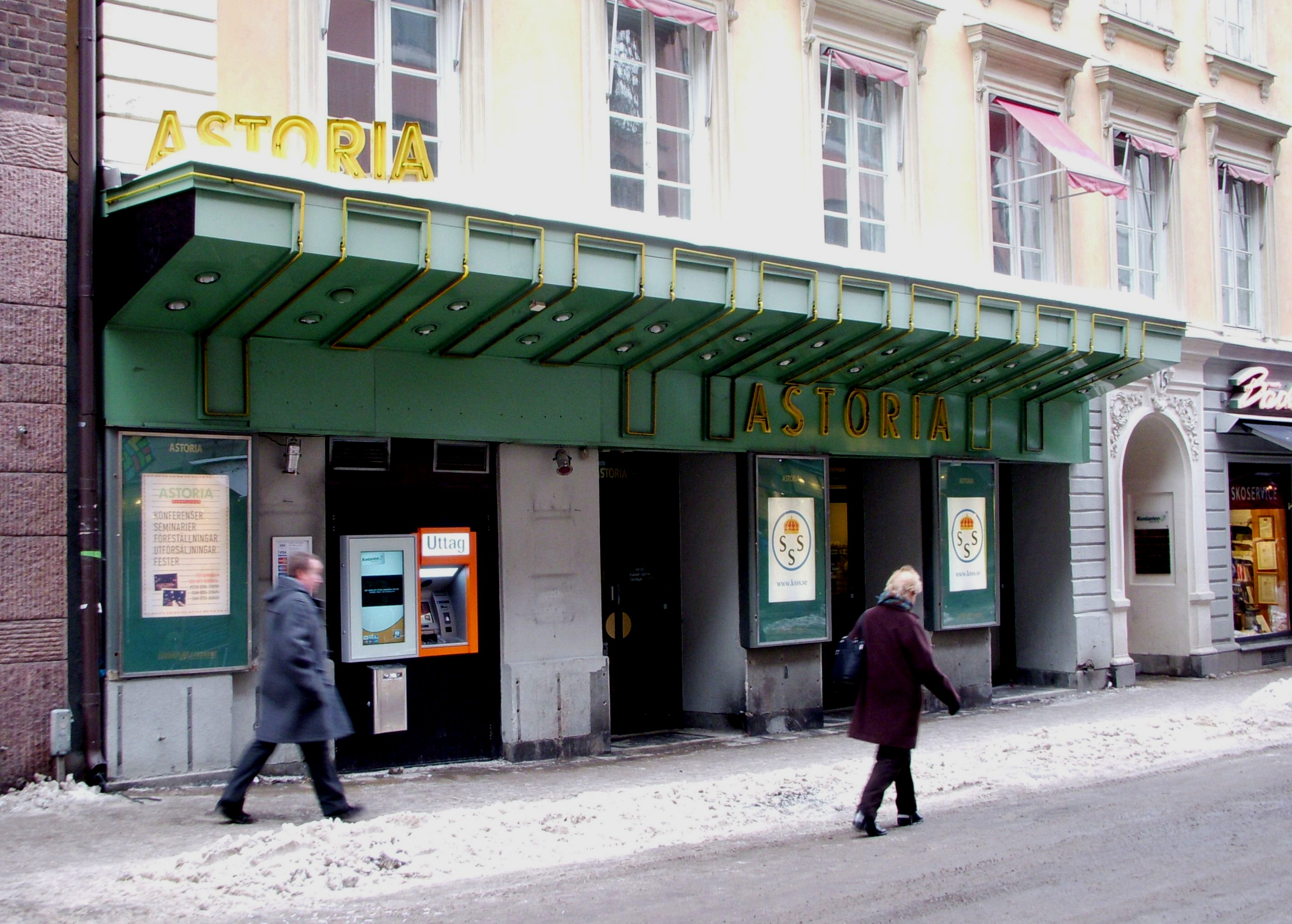 Före detta bioagraf "Astoria", Nybrogatan Stockholm